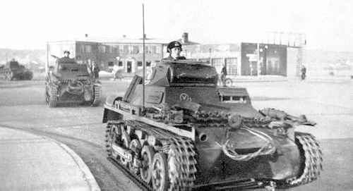 German Pz.Kpfw. I tanks in Åbenrå, Denmark, April 9, 1940